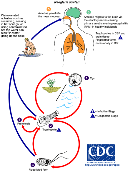 N.Fowleri livscykel